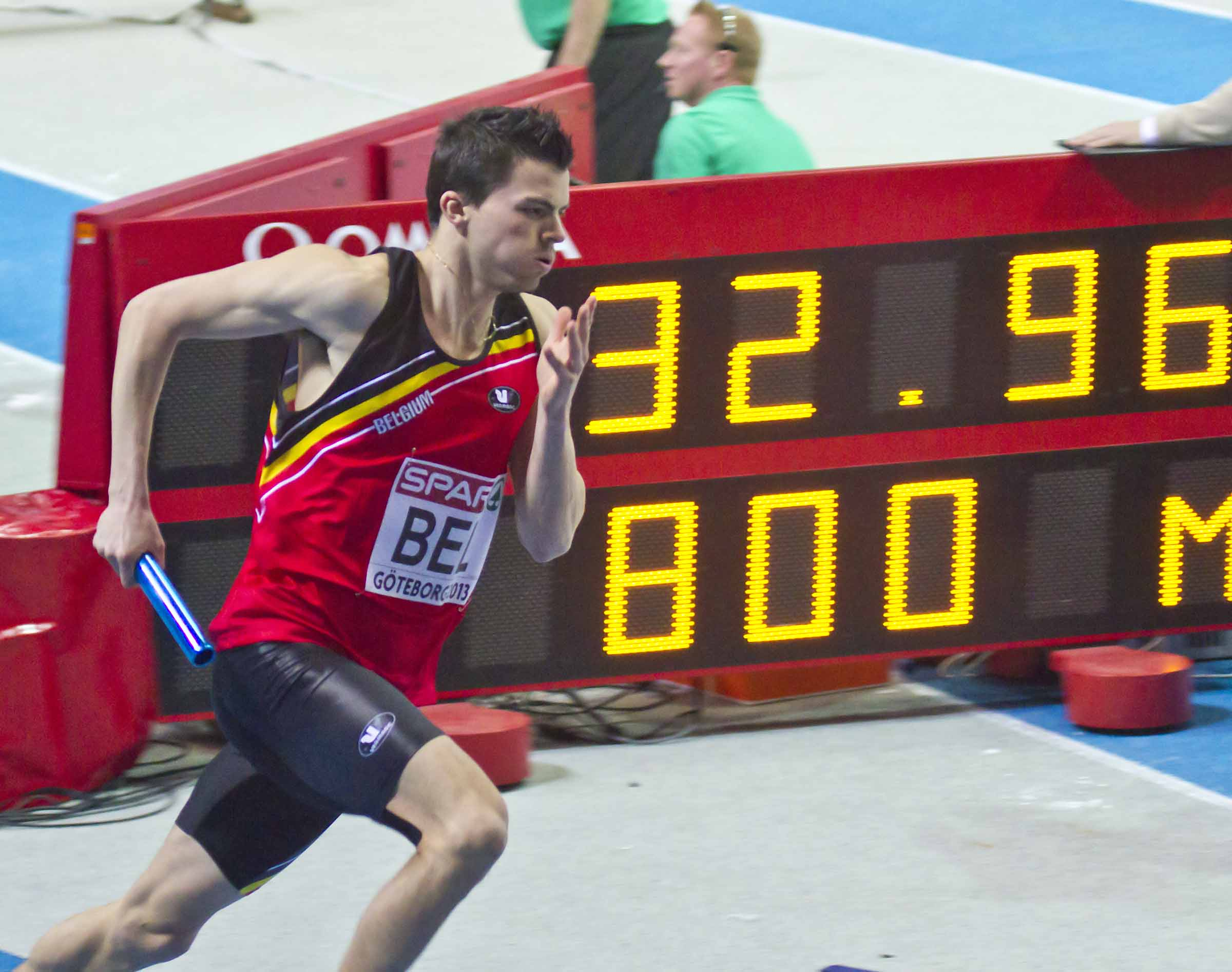 9287 arnaud ghislain 4x400m